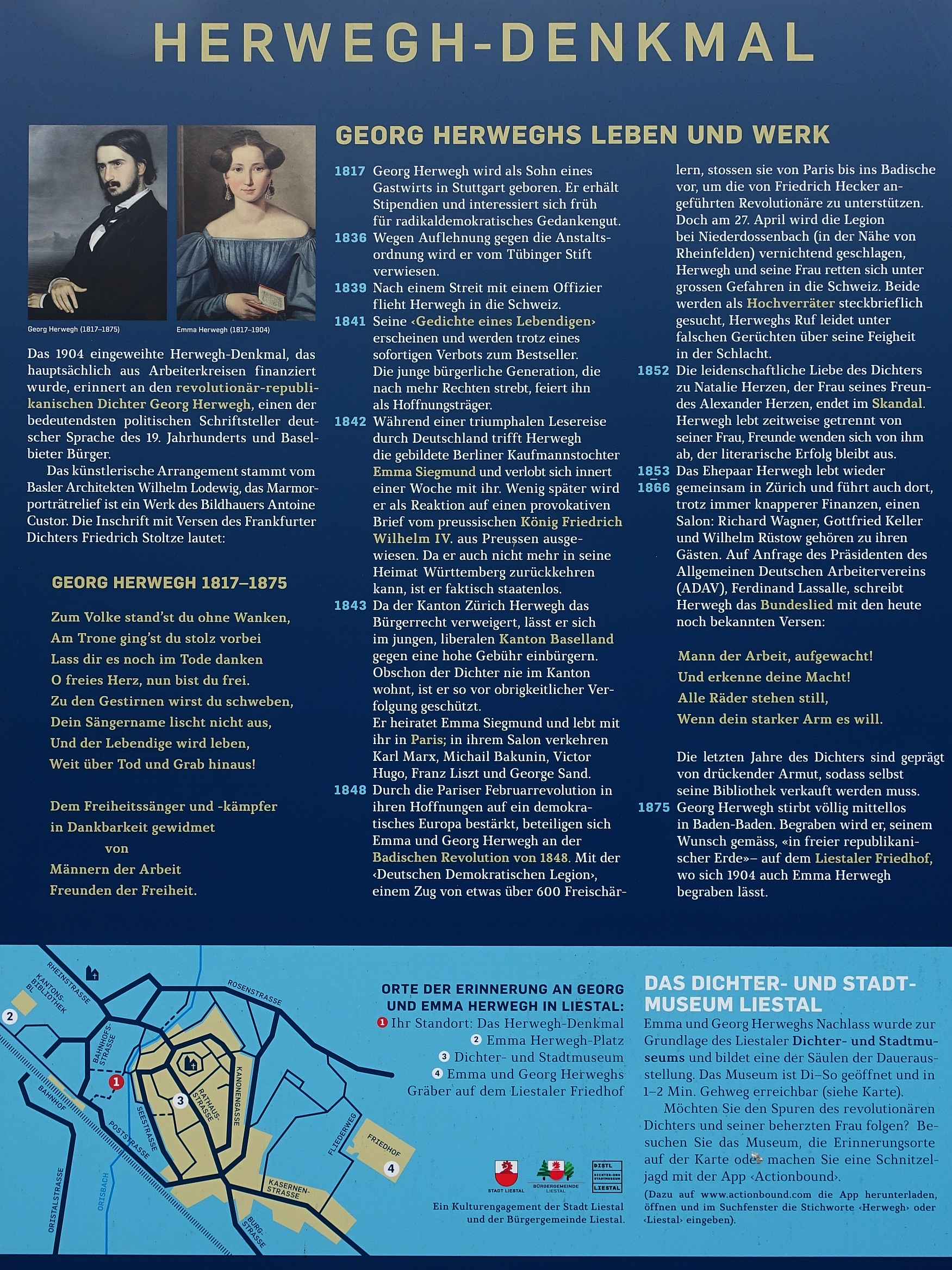 Informations Tafel über Georg Herweghs Leben und Werk beim Denkmal in Liestal